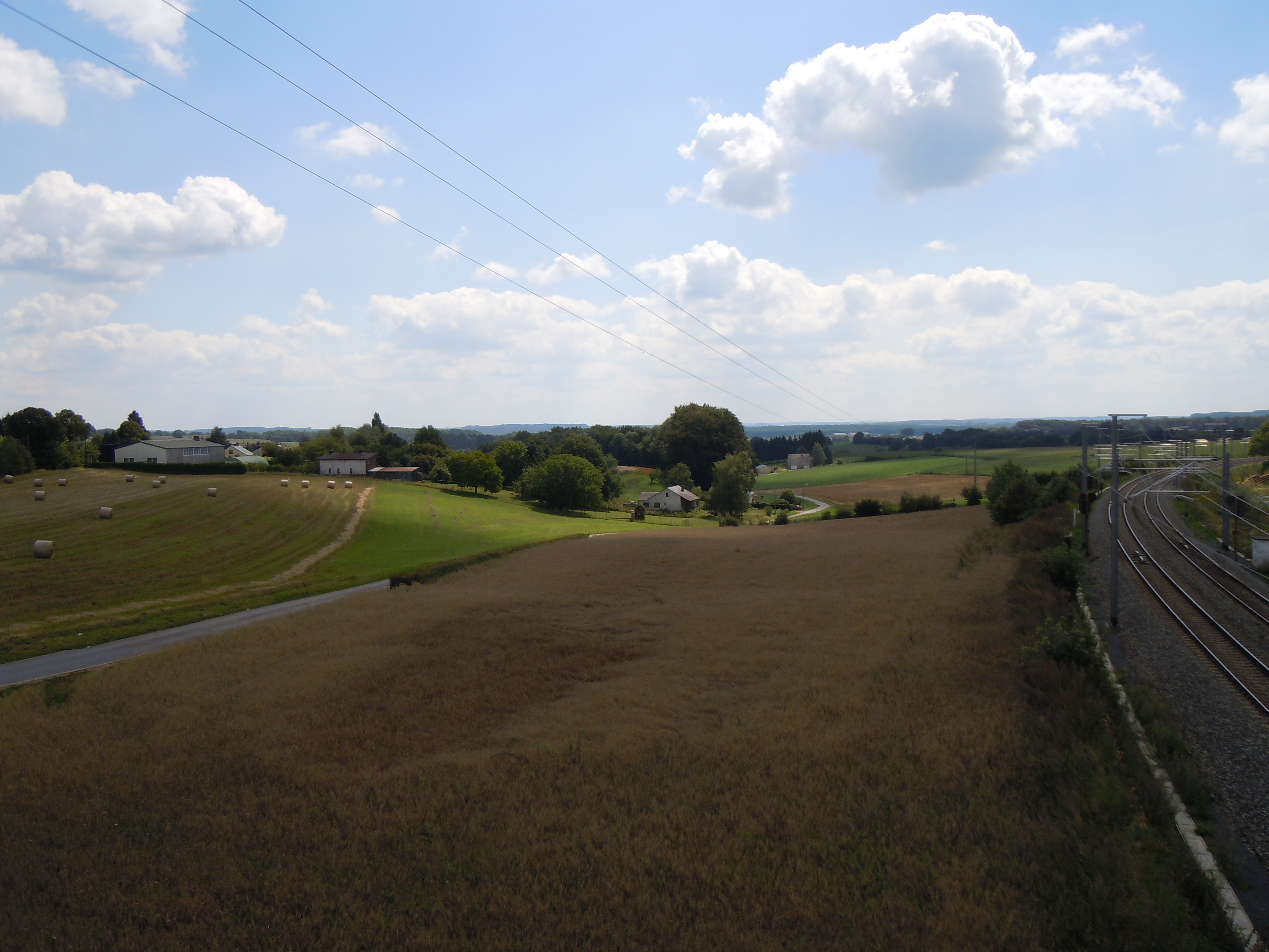 Le hameau belge de Stehnen vu du nord-ouest